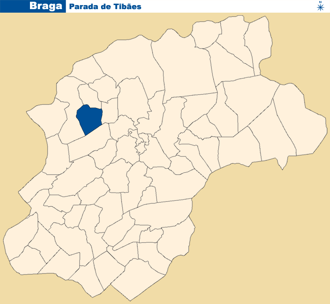 Localização de Parada de Tibães no concelho de Braga.